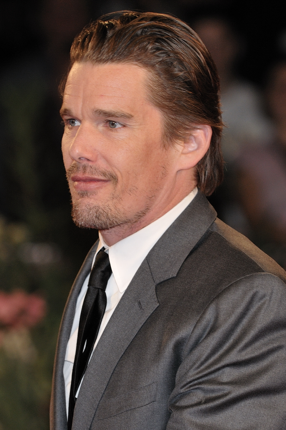 66ème Festival du Cinéma de Venise (Mostra), 8ème jour (07/09/2009) Tapis rouge avec Ethan Hawke et Wesley Snipes et le réalisateur Antoine Fuqua pour le film : Brooklyn's finest